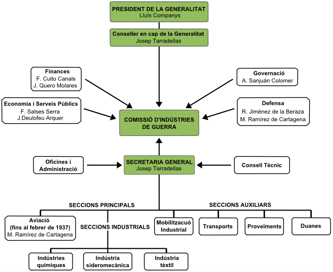 Organigrama de la Comissió d'Indústria de Guerra de Catalunya (1936-1938). Font:Atles de la Guerra Civil a Catalunya